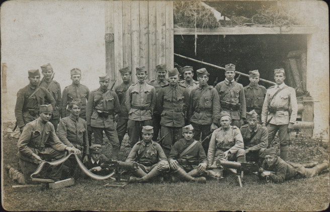 Spomin iz Koroške. Sv. Lovrenc, 27. junija 1919